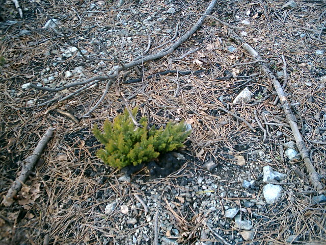 un tipico esempio di pianta pionera: un'erica che cresce su un suolo recentemente devastato da un incendio